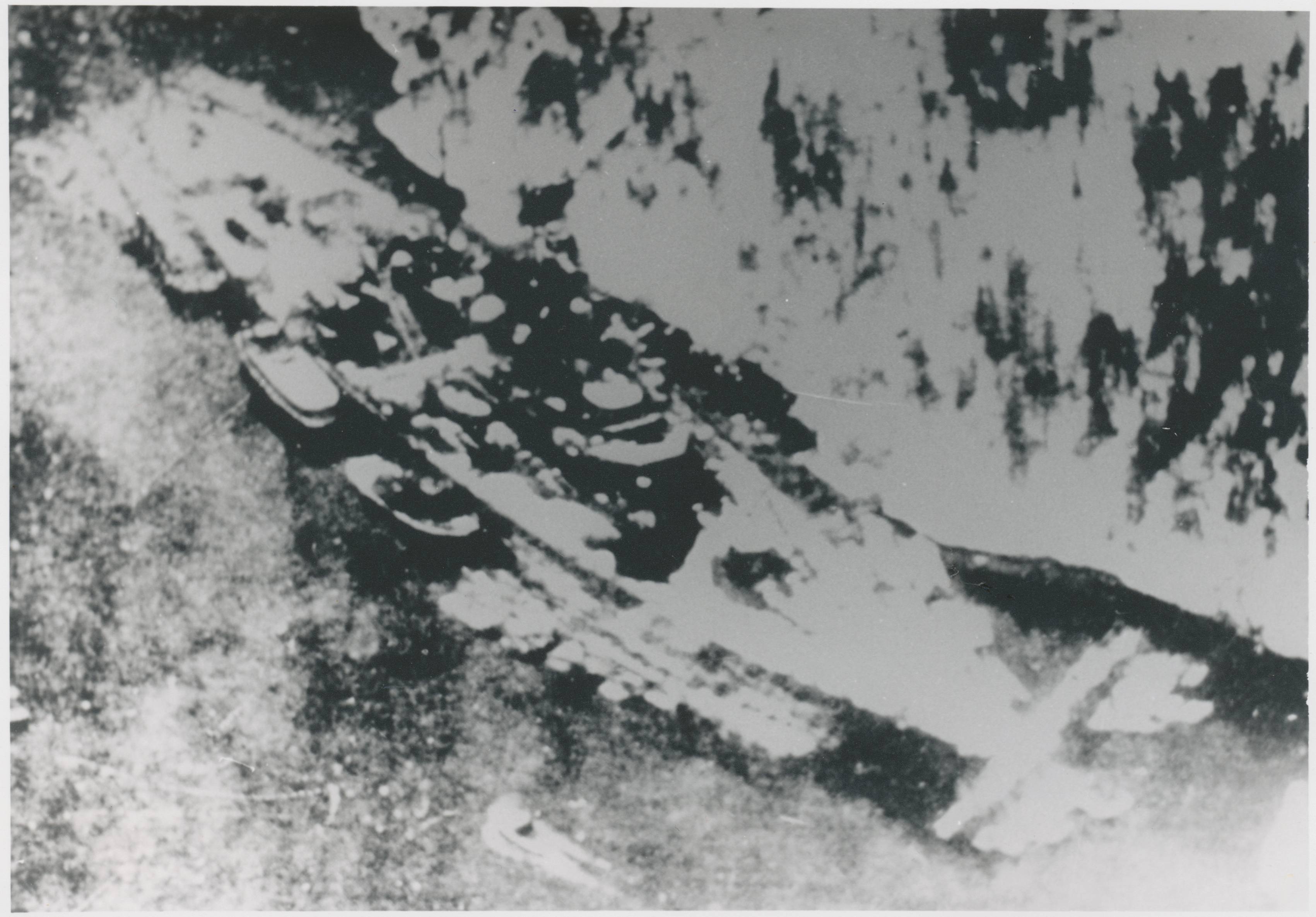 Det tyske slagskipet "Tirpitz" mens det var i Fættenfjorden i Åsen. Bildet er tatt fra et engelsk fly 22.01.1942. Fotograf / Photographer: Ukjent Fotoeier / Photo owner: Åsen Museum og Historielag Digitalisering / Digitizing: Arne Langås Foto-ID / Photo ID: 001-0996 Har du utfyllende opplysninger? Legg gjerne igjen en kommentar nedenfor eller send e-post til . | Do you have additional information? Please leave a comment or send an e-mail to .